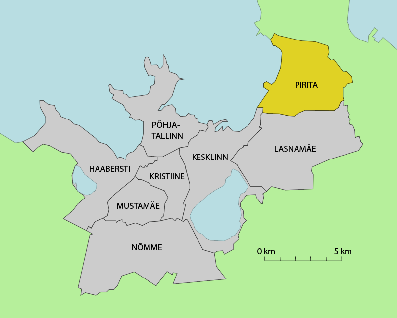 Kaart Pirita linnaosa paiknemisest Tallinnas.